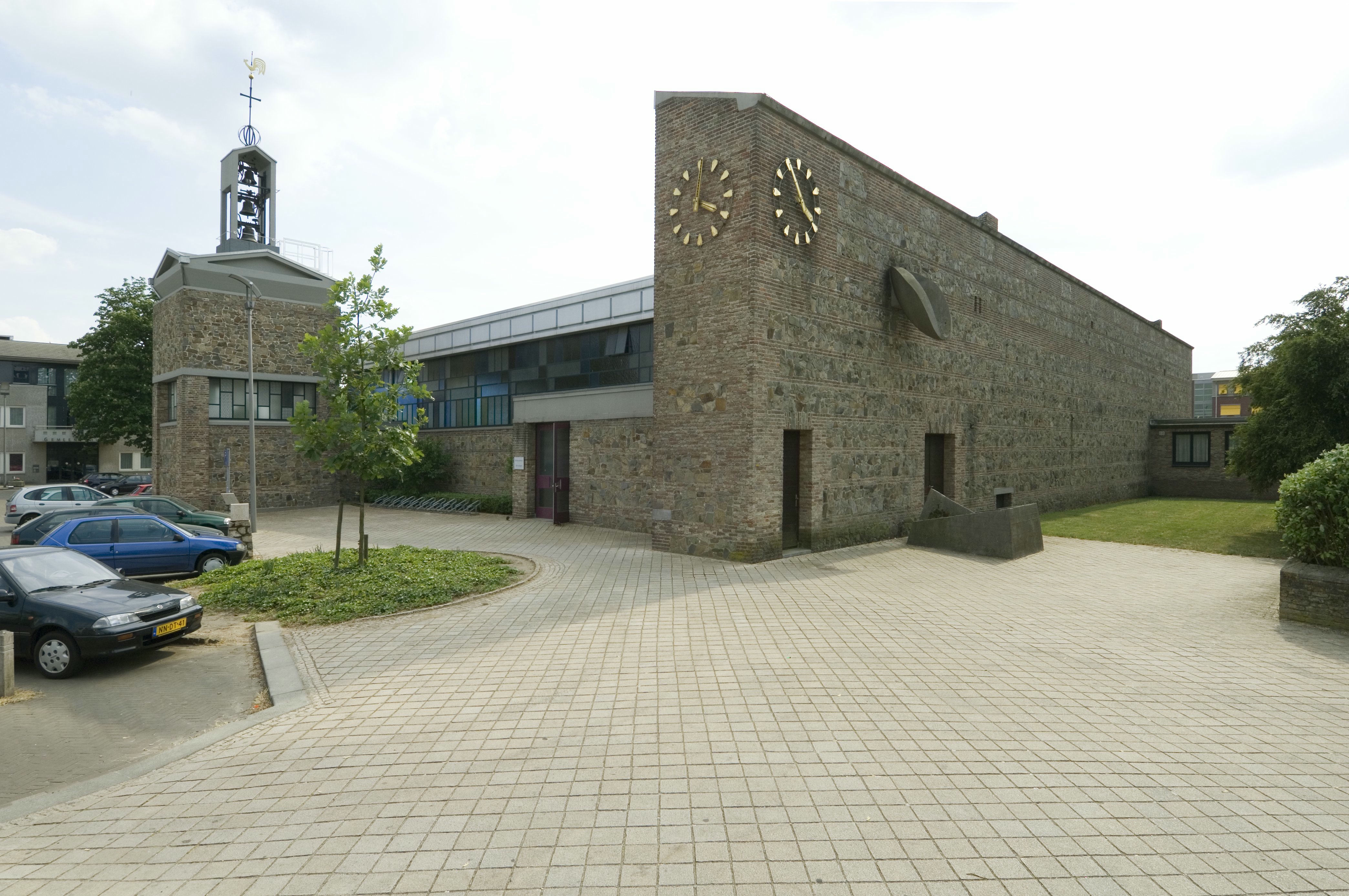 Heilige Antonius Abt: Overzicht van de west en zuidgevel